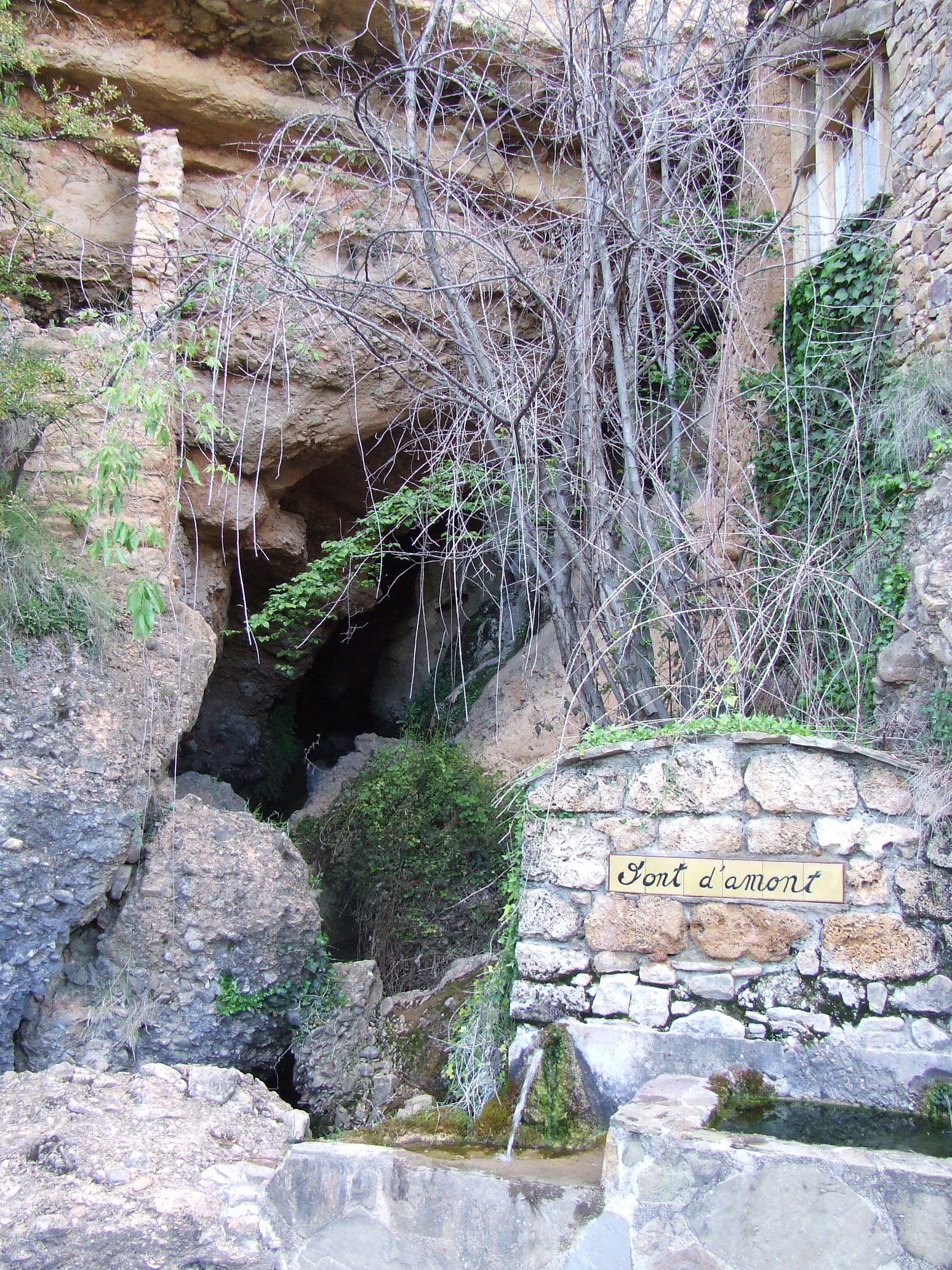 La Font de Rivert, o Font d'Amunt (Toralla i Serradell, Conca de Dalt, Pallars Jussà)